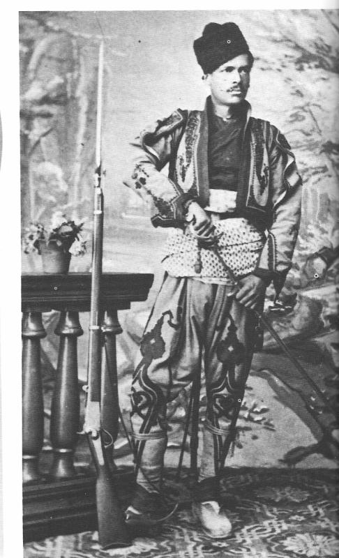 Снимка на Никола Симов-Куруто, знаменосец на Ботевата чета